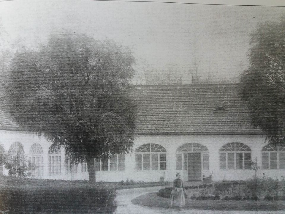 Málas, kastély